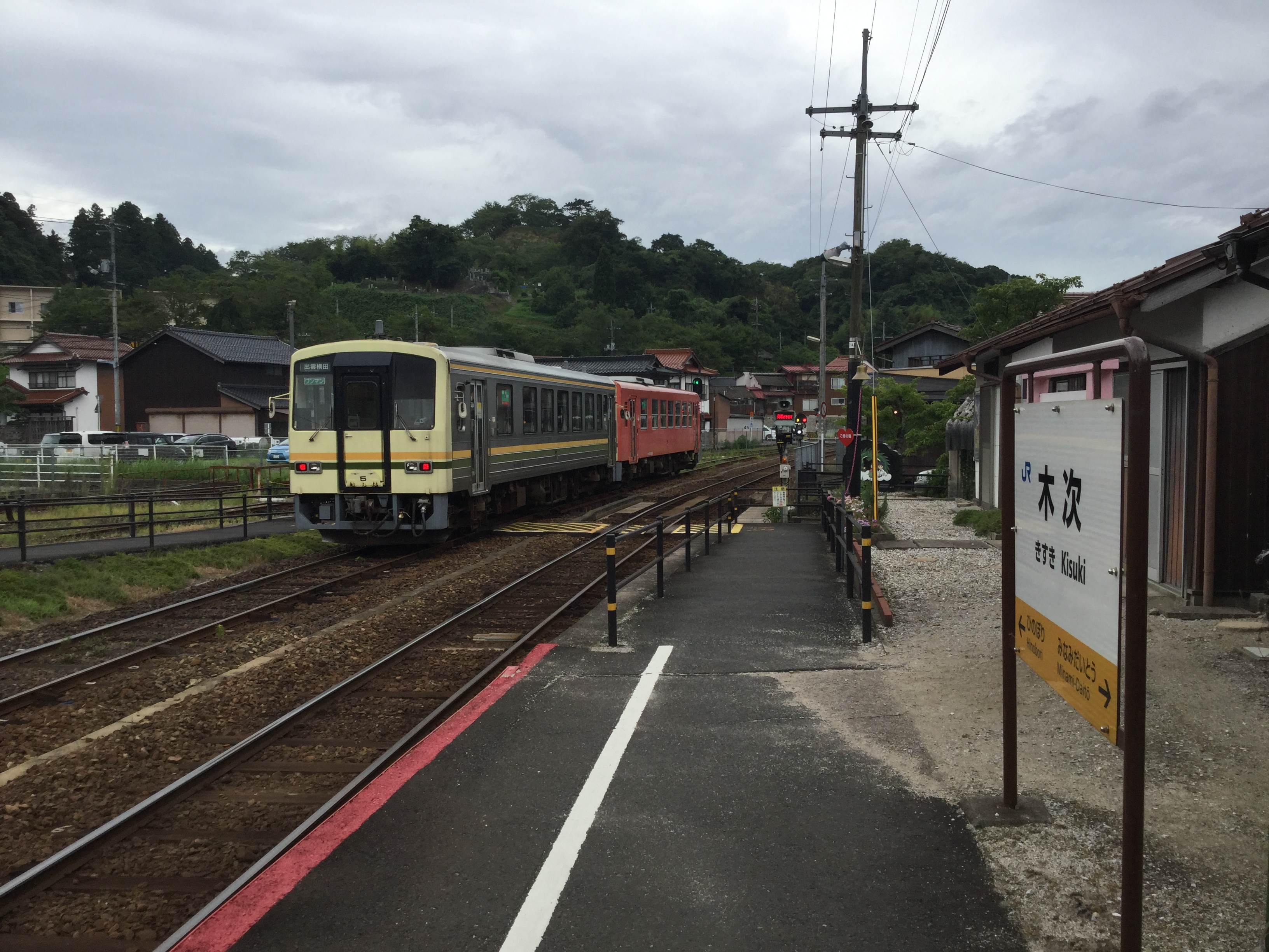 Kisuki Station (木次駅)